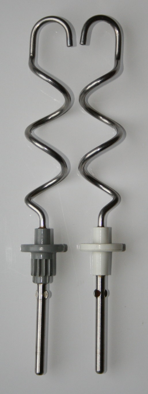 Knethaken von einem Handrührgerät